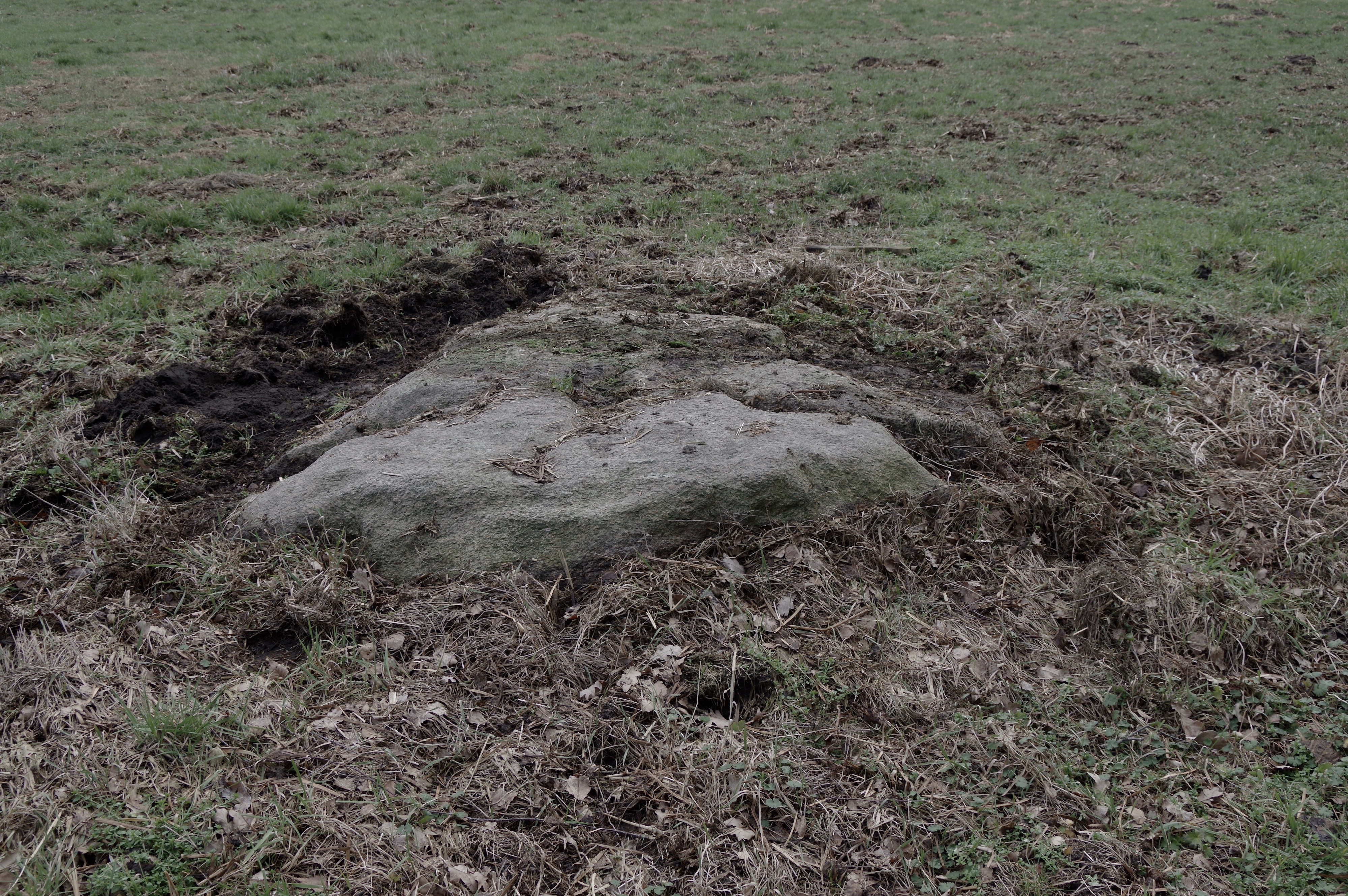 Dieser Findling, Naturdenkmal im Bereich Thölstedt